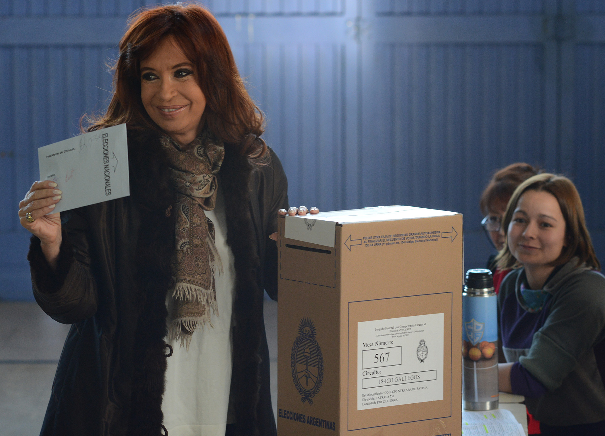 Cristina Fernández de Kirchner votando en las PASO 2015 del 9 de agosto en Río Gallegos, provincia de Santa Cruz, Argentina.